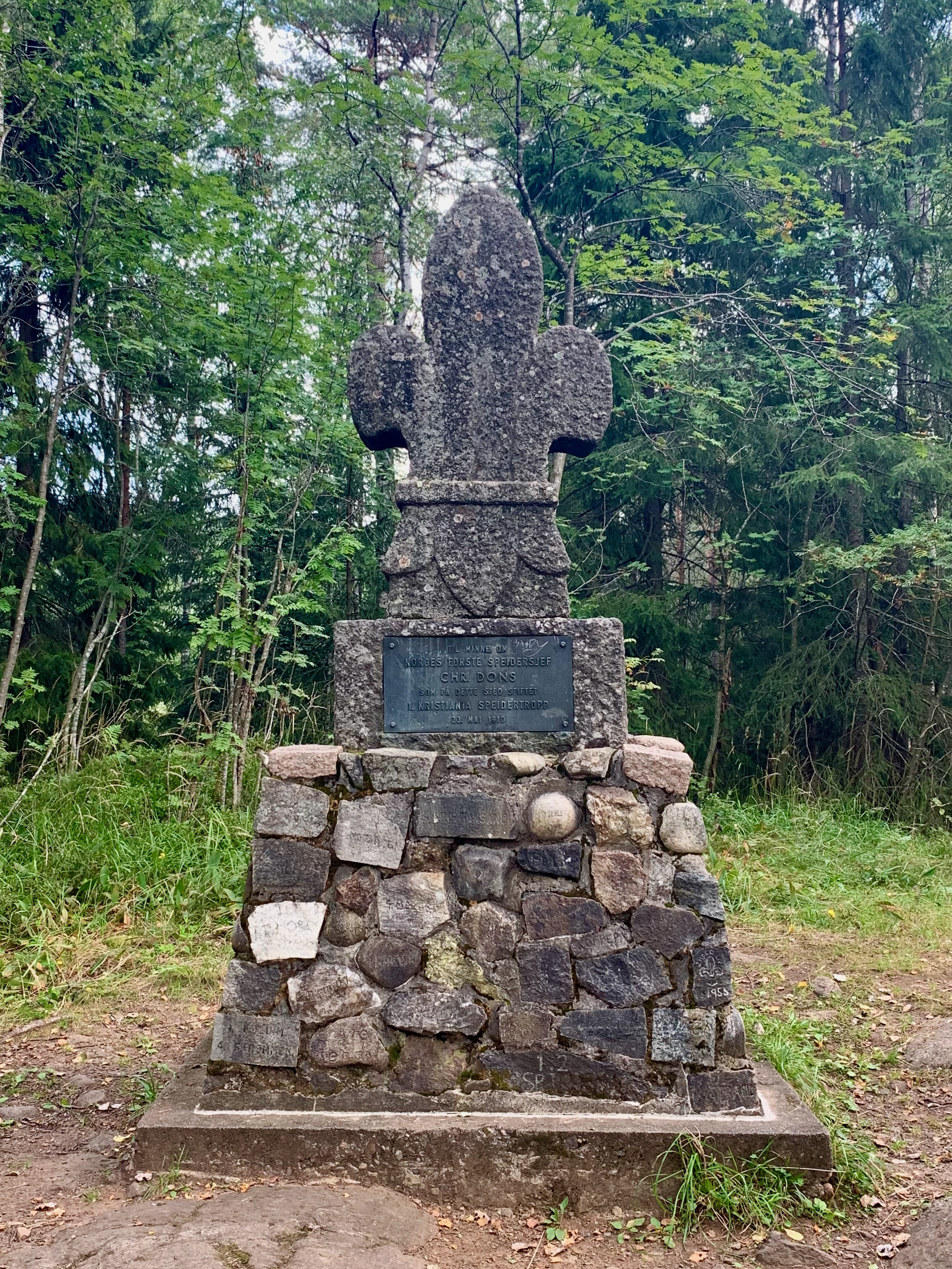 Donsbautaen ved Sarabråten. Østmarka i Oslo.